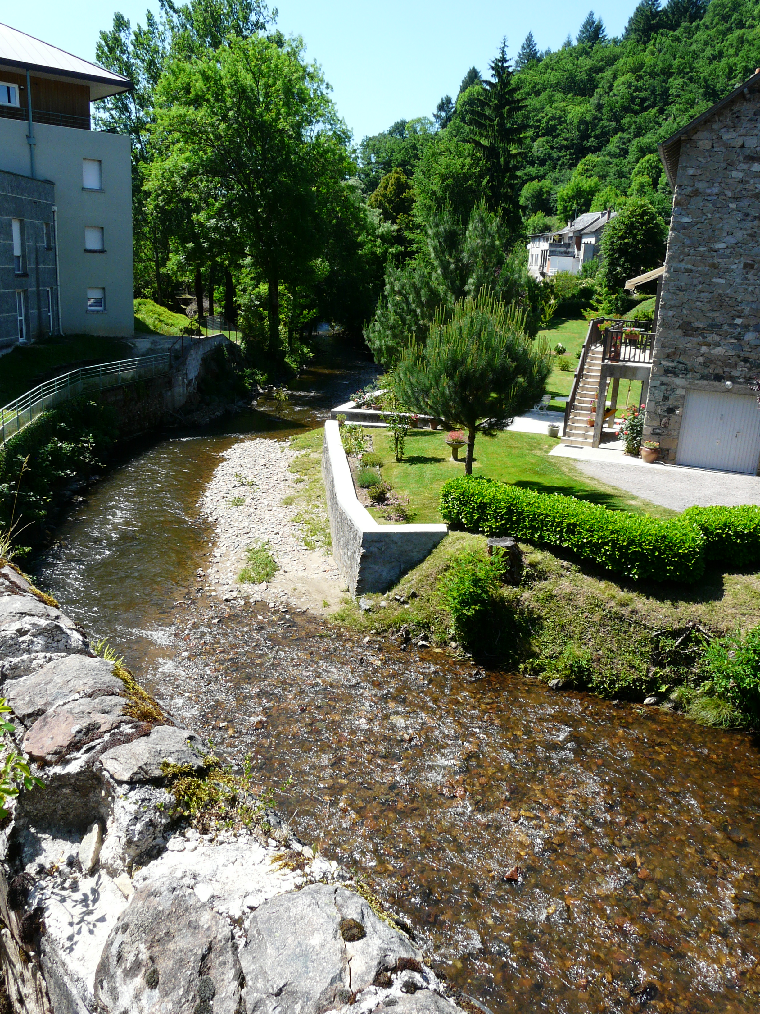 La Saint-Bonnette en aval du pont de la route nationale 120, à Laguenne, Corrèze, France }